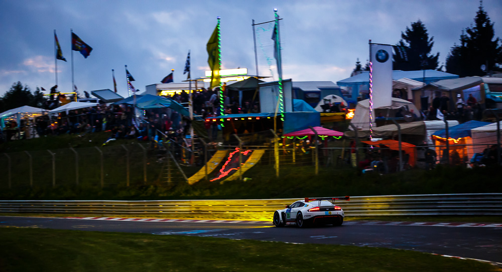 Nachtaufnahme vom 24-Stunden-Rennen im Mai 2015 auf dem Nürburgring. Veröffentlichung mit freundlicher Genehmigung von Björn Fey.